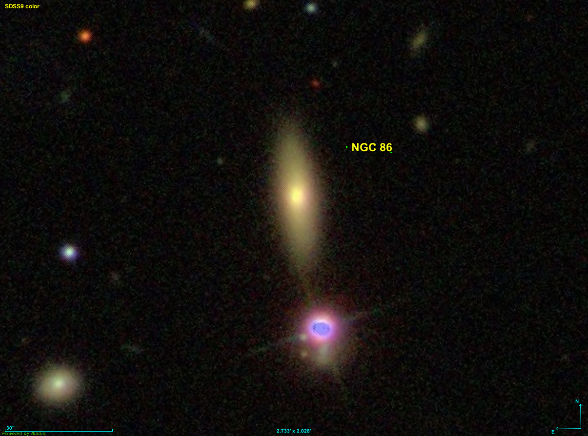 Image créée à l'aide du logiciel Aladin Sky Atlas du Centre de Données astronomiques de Strasbourg et des données publiques en format FIT de SDSS (Sloan Digital Sky Survey).